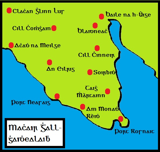 Gàidhlig: Mapa na machrach Ghall-ghaidhealaibh